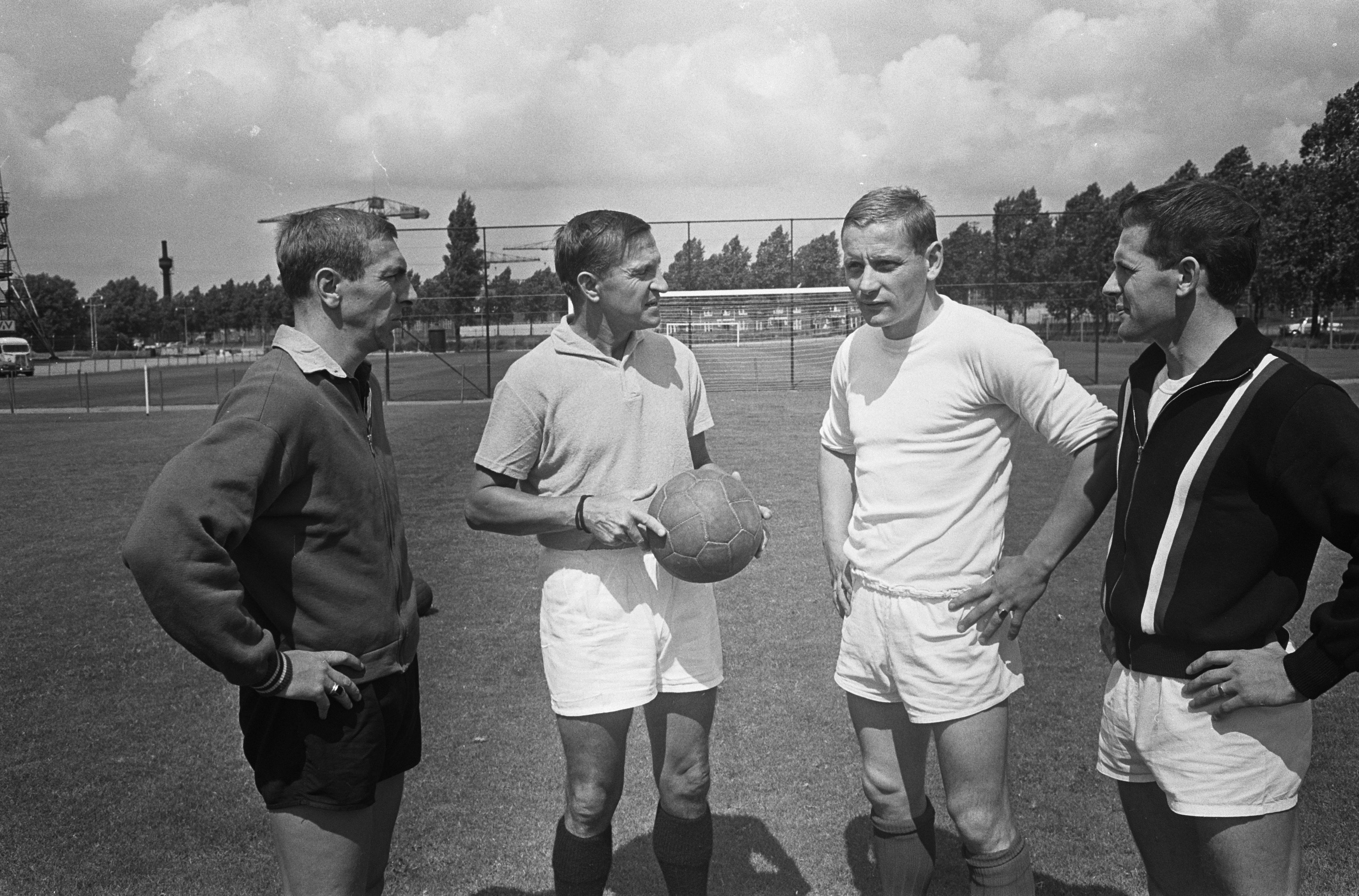 Collectie / Archief : Fotocollectie Anefo Reportage / Serie : [ onbekend ] Beschrijving : Training Feyenoord, de nieuwe aanwinsten v.l.n.r. Leyten [hulptrainer?], trainer Kment, Fransen en Weering Annotatie : Fransen en Weering kwamen beiden over van GVAV Datum : 6 augustus 1965 Trefwoorden : spelers, sport, trainers, voetbal Persoonsnaam : Fransen, Piet, Kment, Willy, Weering, Henny Instellingsnaam : Feyenoord Fotograaf : Koch, Eric / Anefo Auteursrechthebbende : Nationaal Archief Materiaalsoort : Negatief (zwart/wit) Nummer archiefinventaris : bekijk toegang 2.24.01.05 Bestanddeelnummer : 918-0452